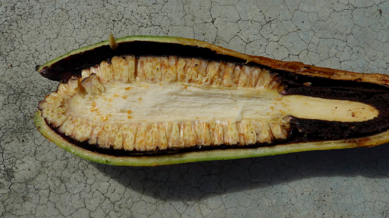 Philodendron hederaceum (Jacq.) Schott